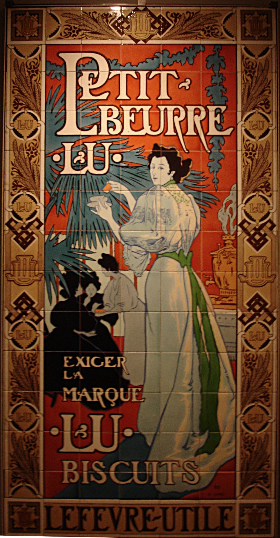 Panneaux en céramique émaillé éxécutés pour l'exposition universelle en 1900 par Eugène Martial Simas - représente les petits beurres LU - photo prise au Musée du château des ducs de Bretagne de Nantes